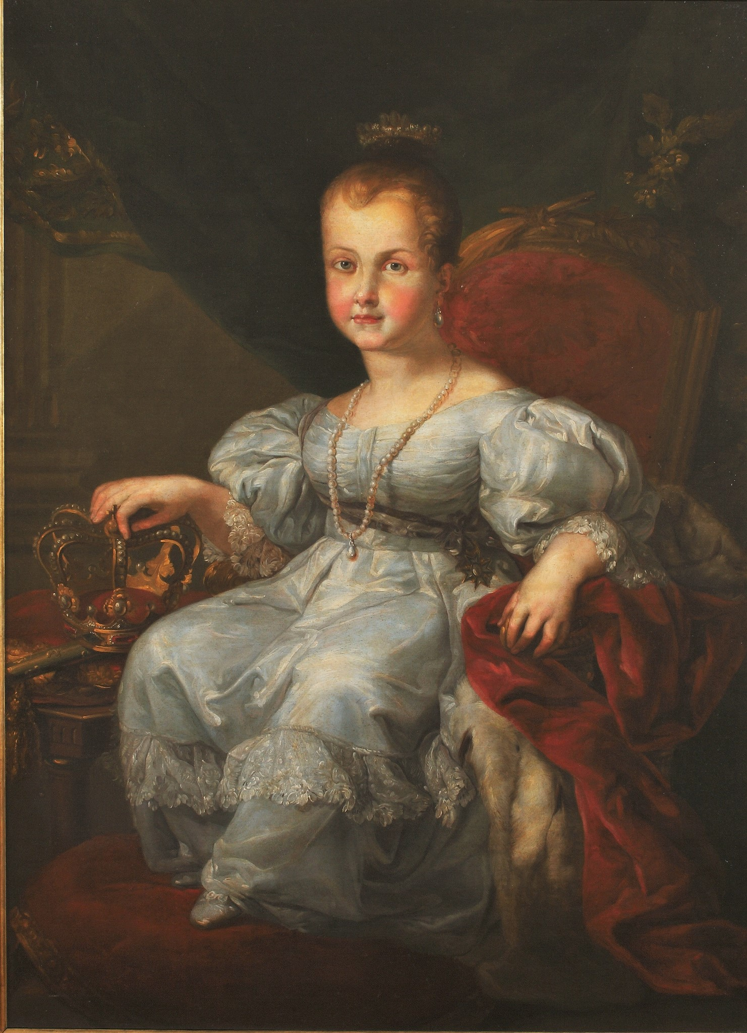 Retrato de la reina niña Isabel II de España (1830-1904), que era hija del rey Fernando VII de España y de la reina María Cristina de Borbón-Dos Sicilias.